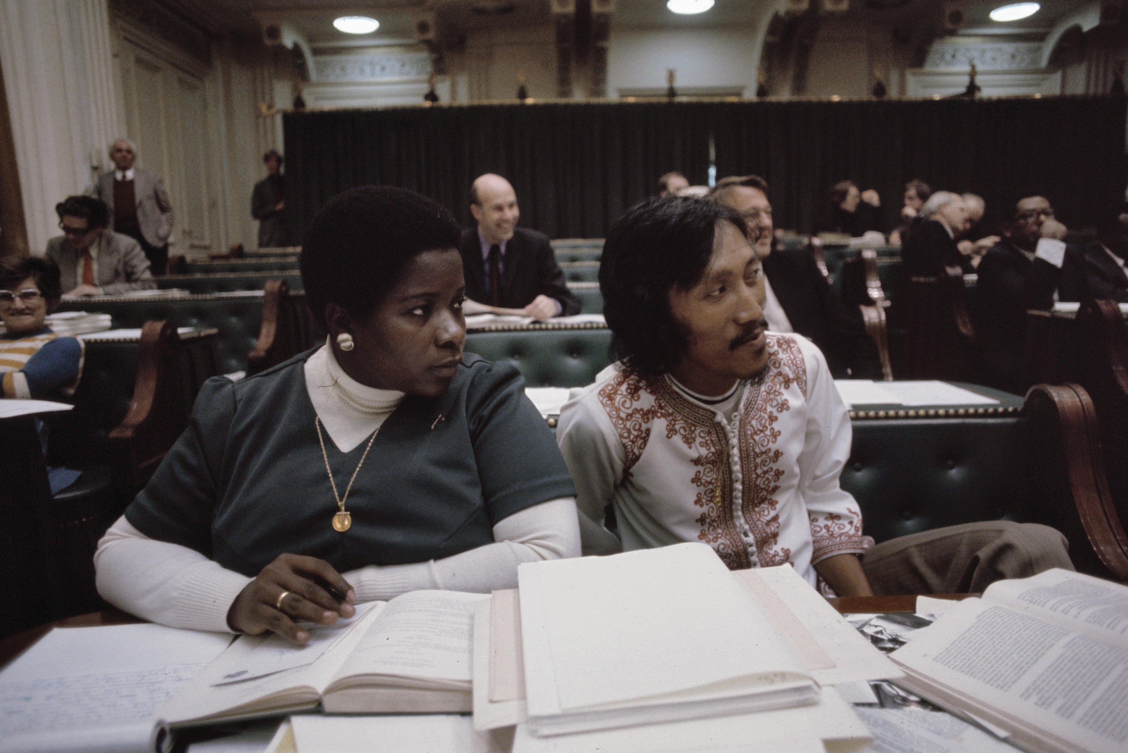 Collectie / Archief : Fotocollectie Anefo Reportage / Serie : [ onbekend ] Beschrijving : Koninkrijksdebat in Tweede Kamer met Surinaamse Statenleden; Somohardjo (rechts) en Liesdek Clarke (links) Datum : 21 oktober 1975 Locatie : Den Haag, Zuid-Holland Trefwoorden : Statenleden Persoonsnaam : Liesdek-Clarke, A.J., Somohardjo, Paul Fotograaf : Mieremet, Rob / Anefo Auteursrechthebbende : Nationaal Archief Materiaalsoort : Dia (kleur) Nummer archiefinventaris : bekijk toegang 2.24.01.06 Bestanddeelnummer : 254-9706